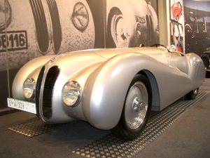 BMW 328 Mille Miglia Photograph: Friedrich Kromberg Copyright Status: GNU Freie Dokumentationslizenz Originalversionen auf Anfrage erhältlich